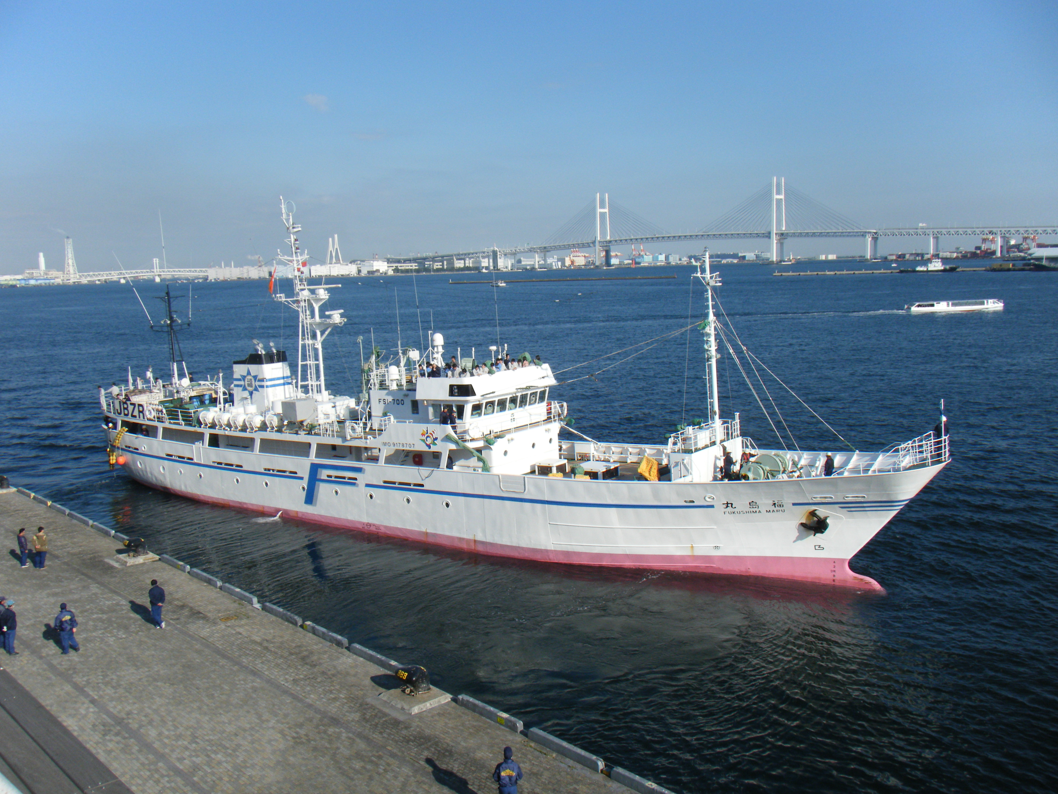 福島県の漁業実習船 5代目福島丸、横浜港にて2014年撮影